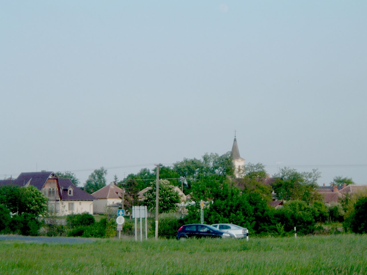 Vát, Hungary